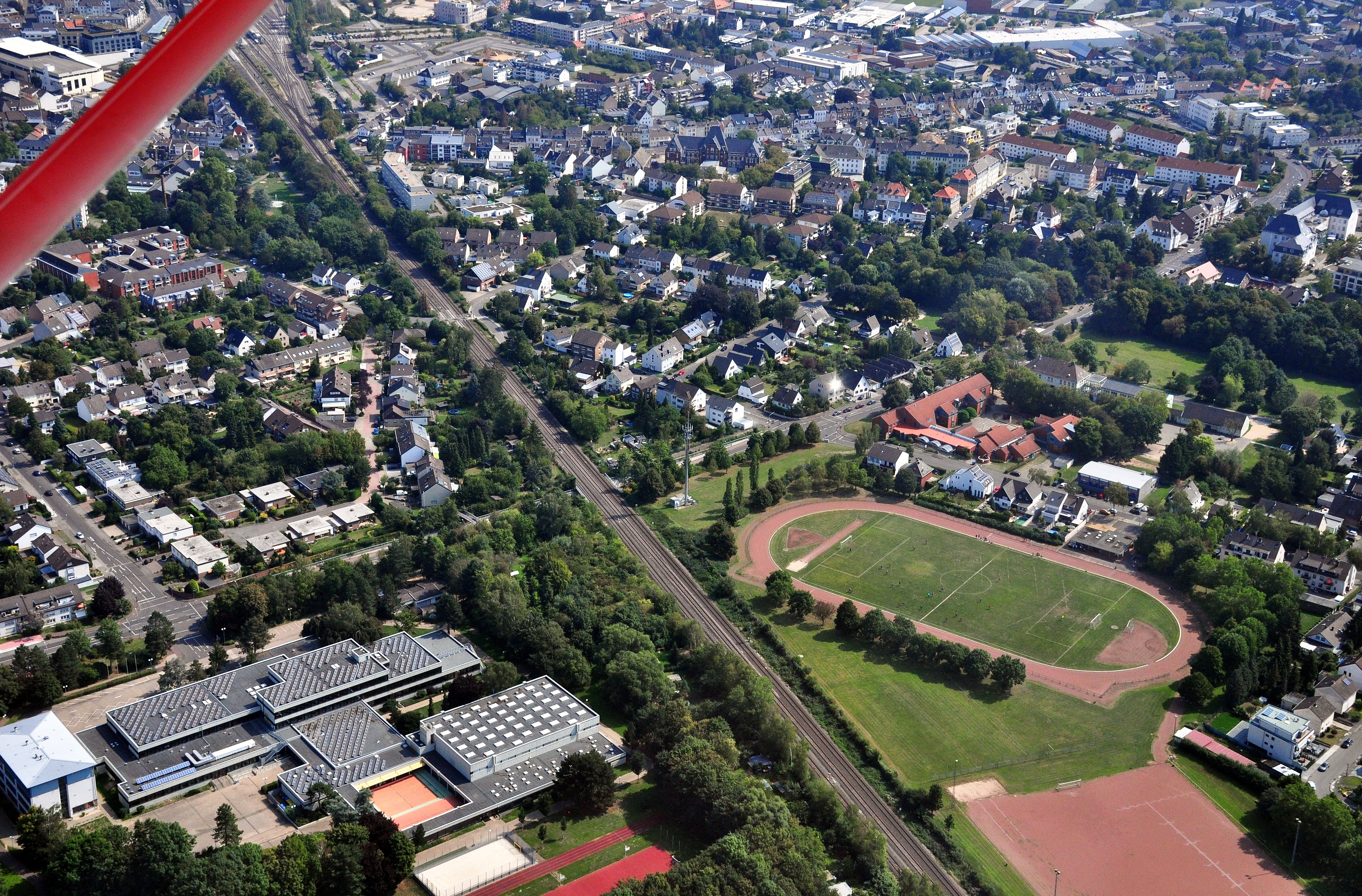 Luftbild Euskirchen aus NW-Richtung mit Sportanlage „Im Auel“ (Heinz-Flohe-Sportpark), Marienschule, Hans-Verbeek-Schule, Franziskusschule